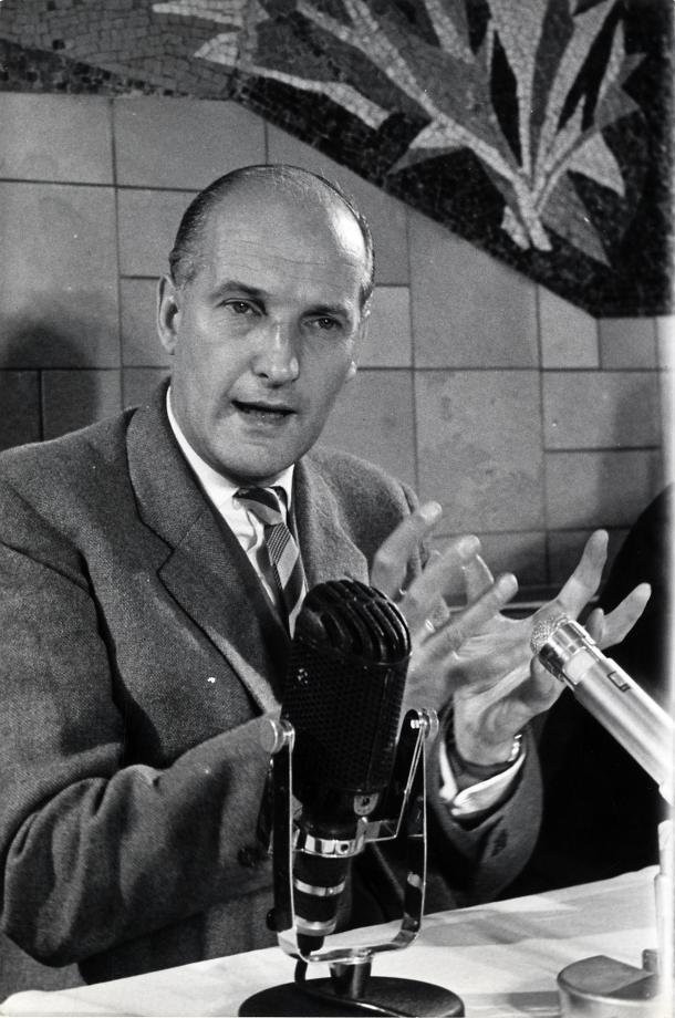 Bot, T.H. (KVP). Persconferentie op Schiphol van staatssecretaris van buitenlandse zaken mr. Th. H. Bot, na terugkomst van zijn reis naar Nederlands Nieuw-Guinea. Nederland, Amsterdam, Schiphol, 25 februari 1960.